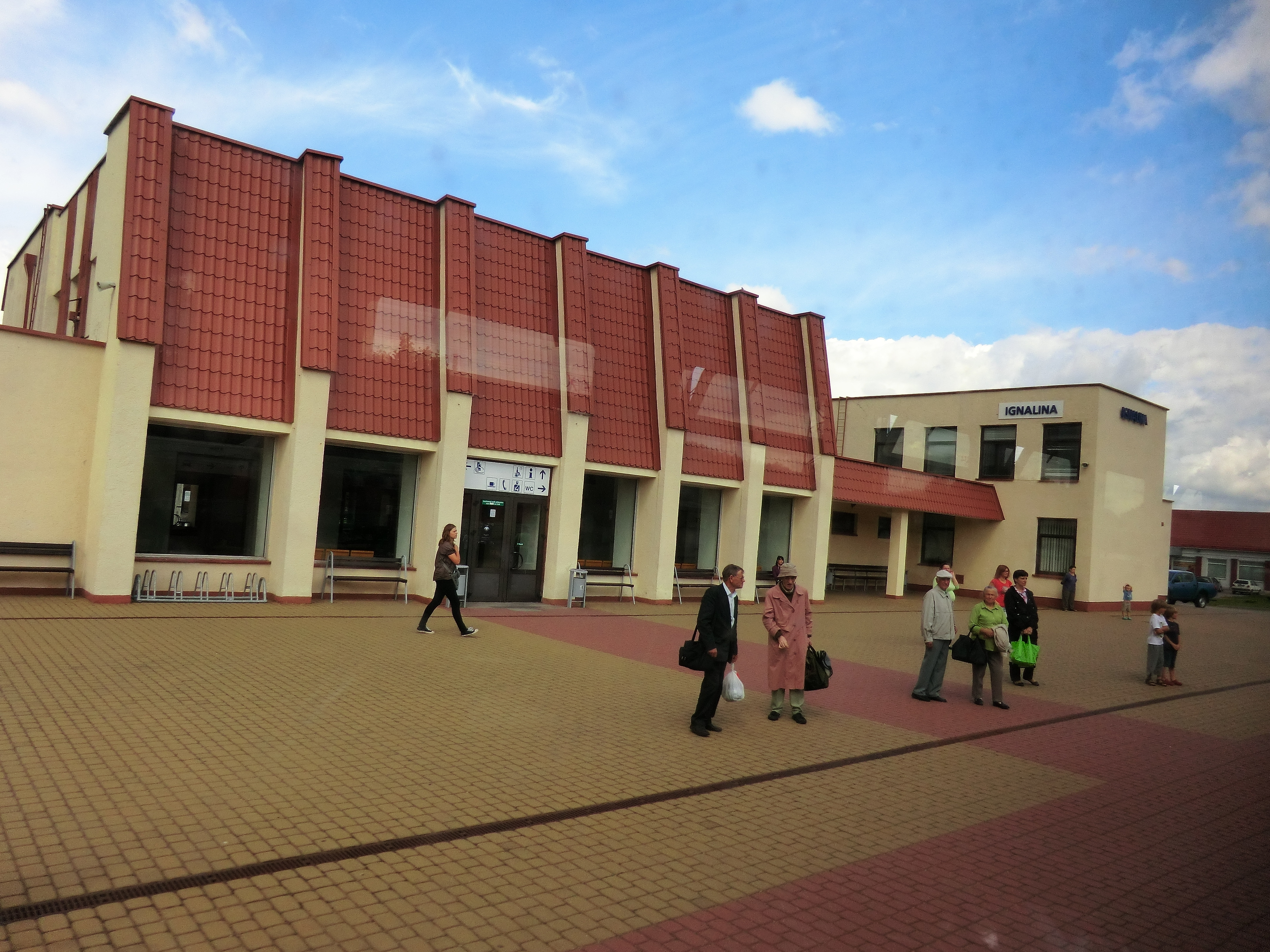 Ignalina, Lithuania